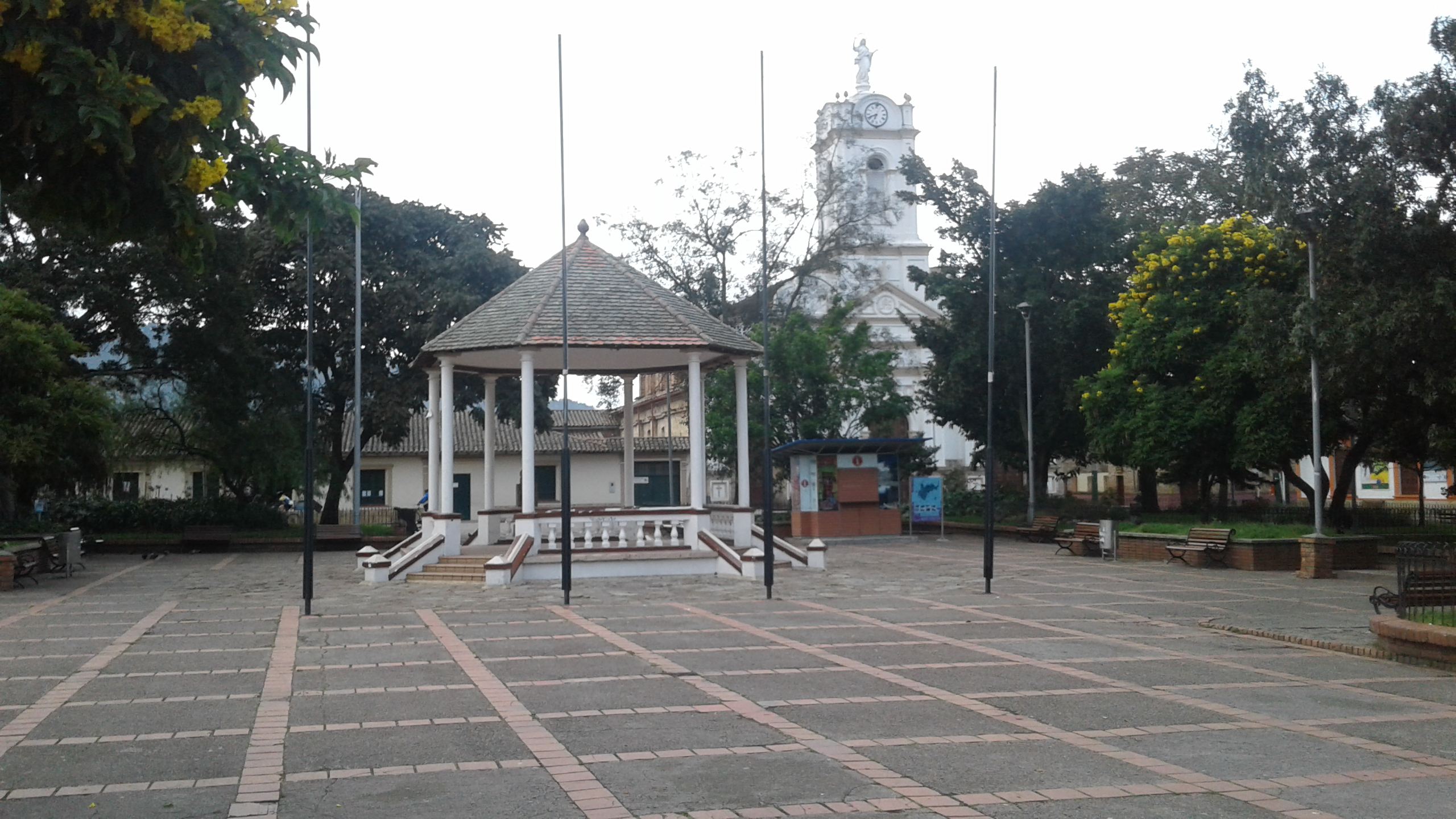 Parque principal (Tabio, Cundinamarca, Colombia) - vista desde el edificio de la alcaldía